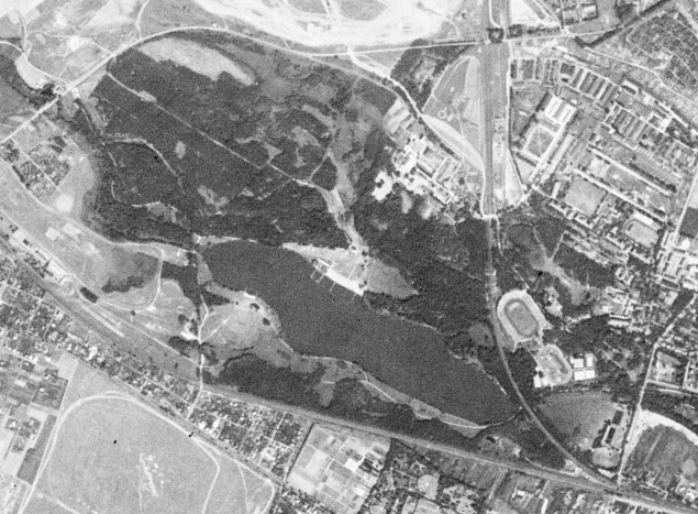 Tereny Jeżyc, Golęcina i Strzeszyna sfotografowane przez amerykańskiego satelitę wywiadowczego KH-4A 1023, 23 sierpnia 1965 r. Centralnie położone jezioro Rusałka. Widoczny przebieg ulicy Lutyckiej (DK92; skrajnie u góry), pod nią Fort VIa Twiedzy Poznań, Niestachowskiej (DK11, skrajnie po prawej) i Dąbrowskiego (po lewej u dołu, brak trasy św. Wawrzyńca). Od prawego dolnego rogu widać rozbiegające się dwie linie kolejowe. Widoczne obiekty Towarzystwa Sportowego Olimpia (brak 3 stadionu). Nad nimi widoczne koszarowe zabudowania Centrum Szkolenia Wojsk Lądowych.